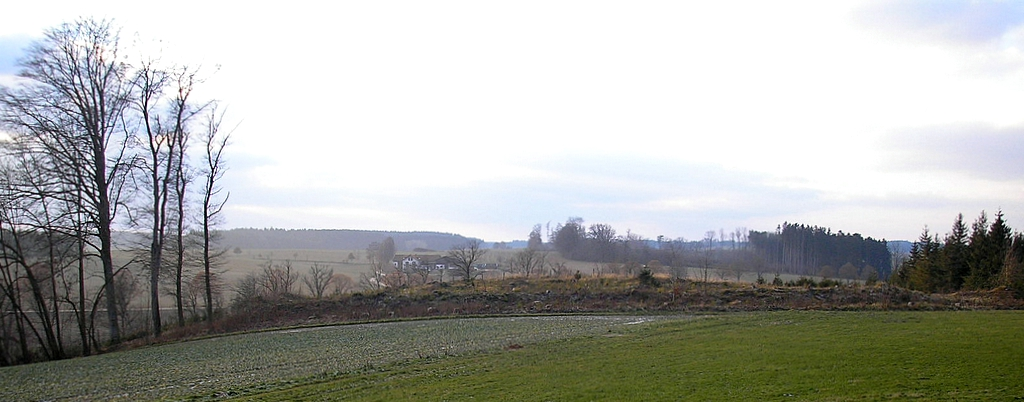 Frühmittelalterlicher Ringwall bei Mittelstetten (Landkreis Fürstenfeldbruck, Oberbayern). Gesamtansicht von Osten. Eigene Aufnahme, Dez. 2007 / Early Middle Ages ringwork castle near Mittelstetten (Landkreis Fuerstenfeldbruck, Upper Bavaria, Germany). Total view from the east. Own photo, Dec. 2007